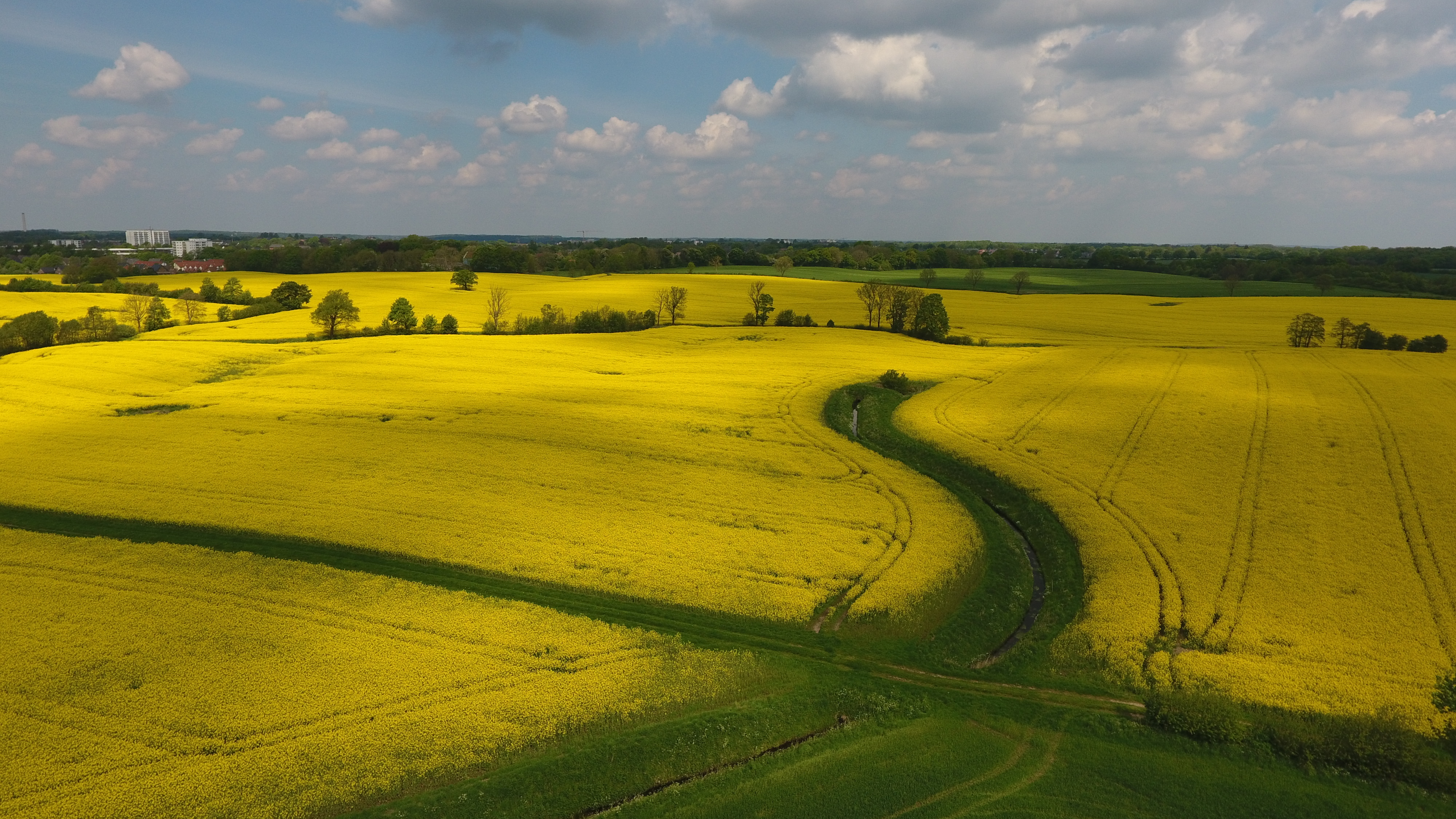 Blick auf einen Bewässerungsgraben im Landschaftsschutzgebiet Vogelsang.